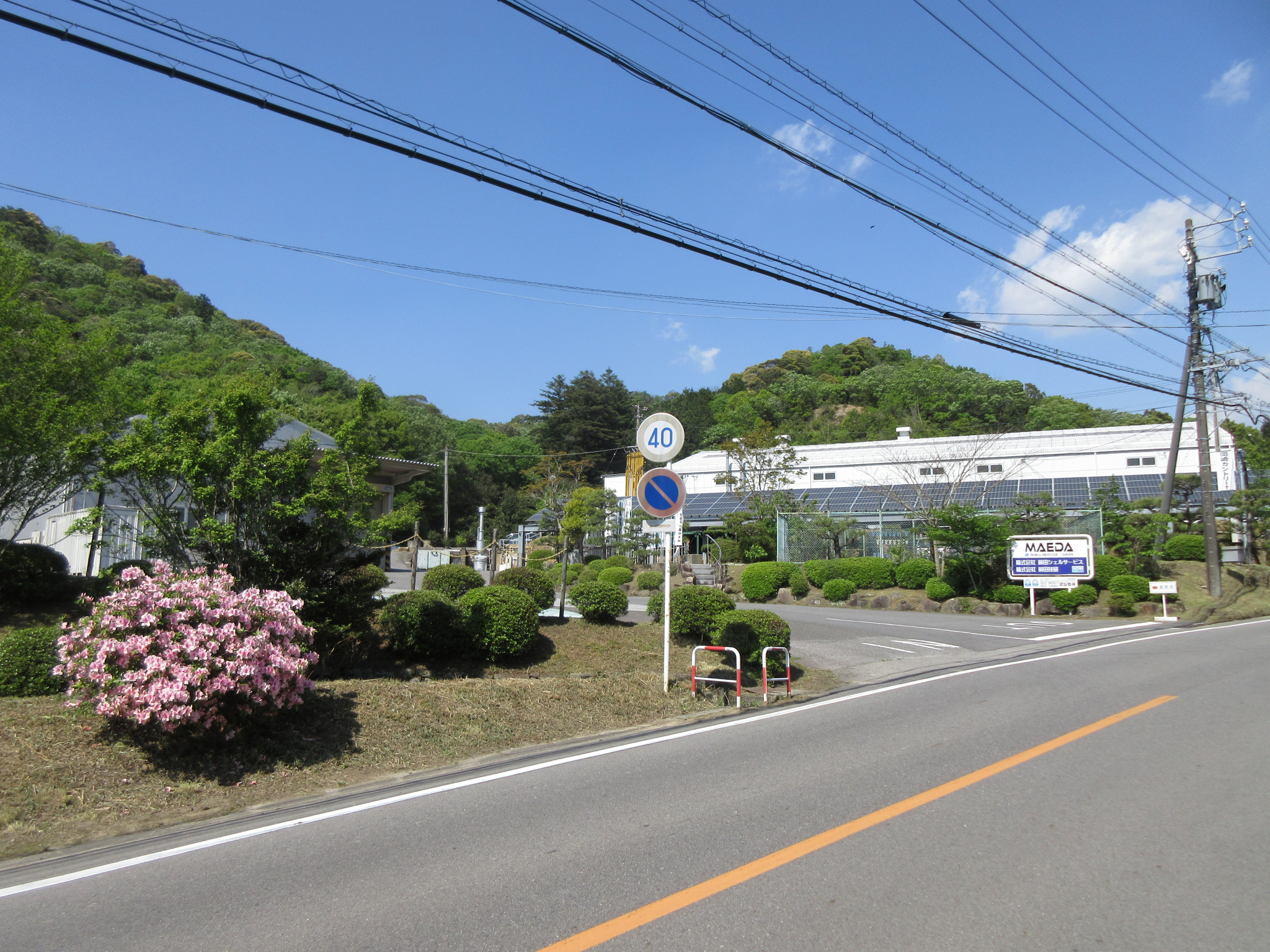 前田シェルサービス（岡崎市池金町）